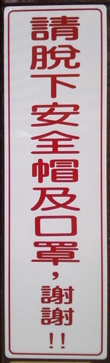 台灣金融機構在李師科案後都要求所有人進入前必須脫下安全帽和口罩，攝於台灣高雄市某家銀行門口。